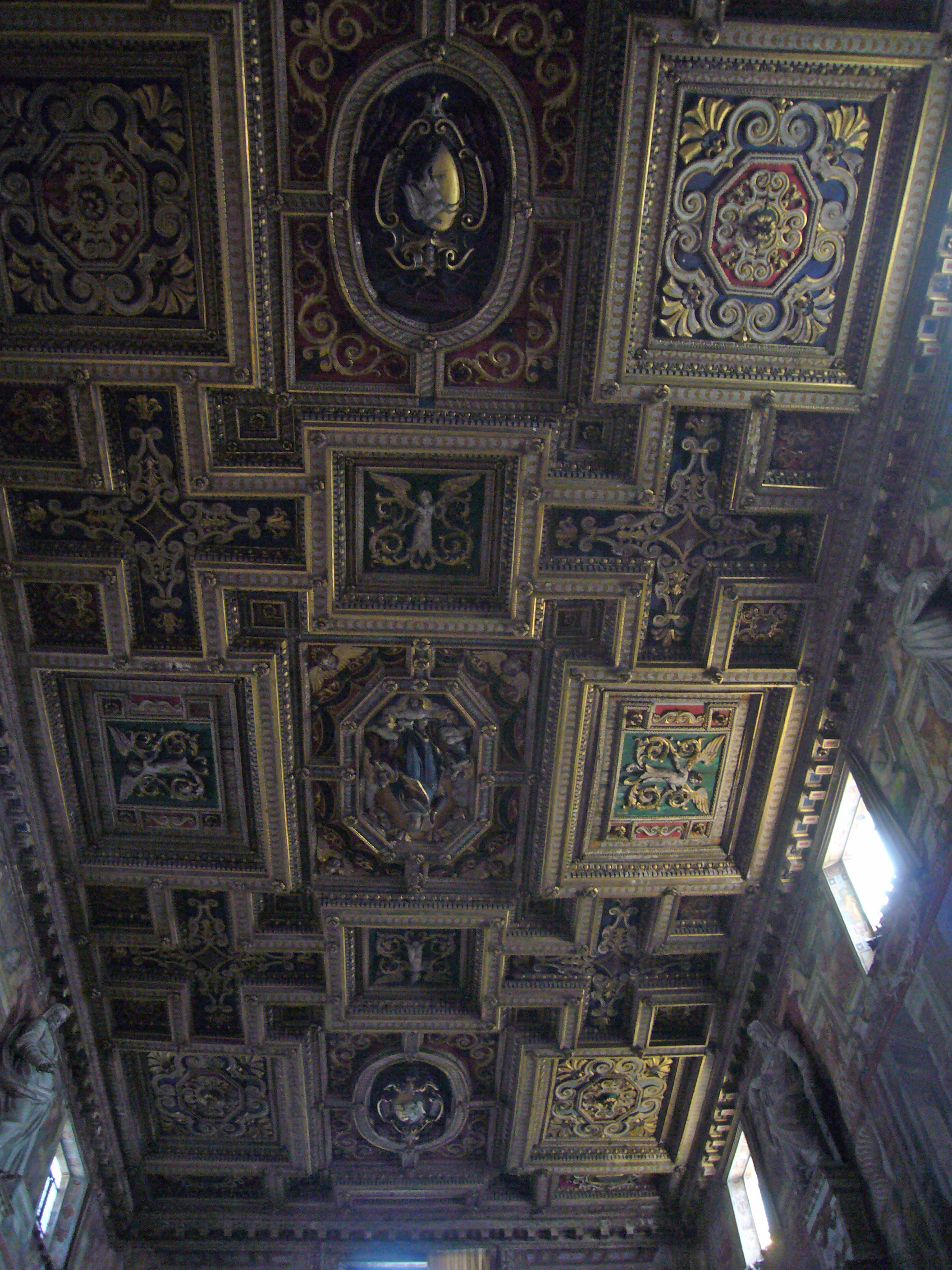 Roma, santa Susanna alle Terme di Diocleziano, soffitto